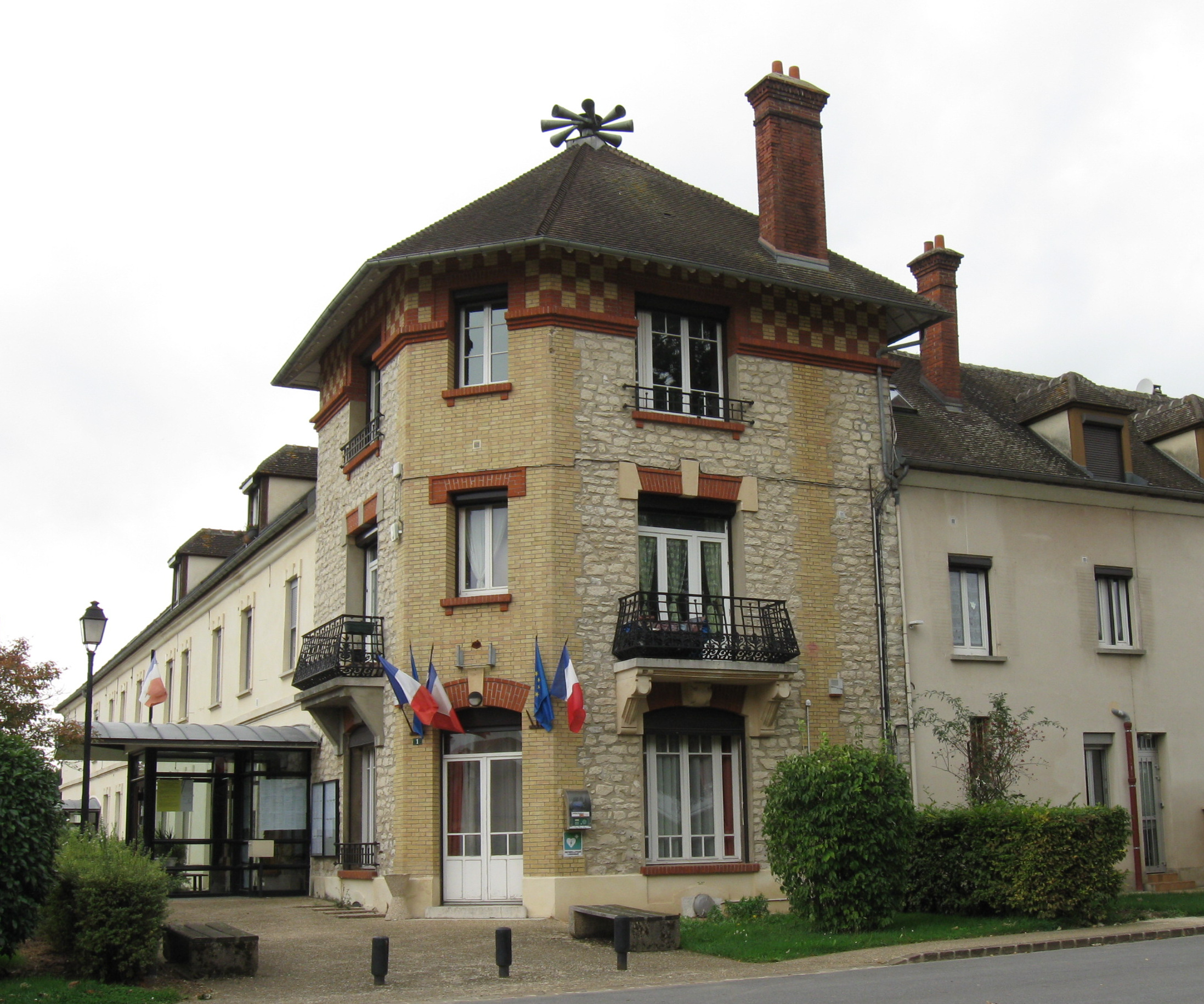 Mairie de Compans (département de la Seine-et-Marne, région Île-de-France).